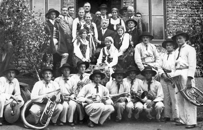 X-lecie Ogniska Związku Podhalan w Radziechowach 02.08.1936 rok